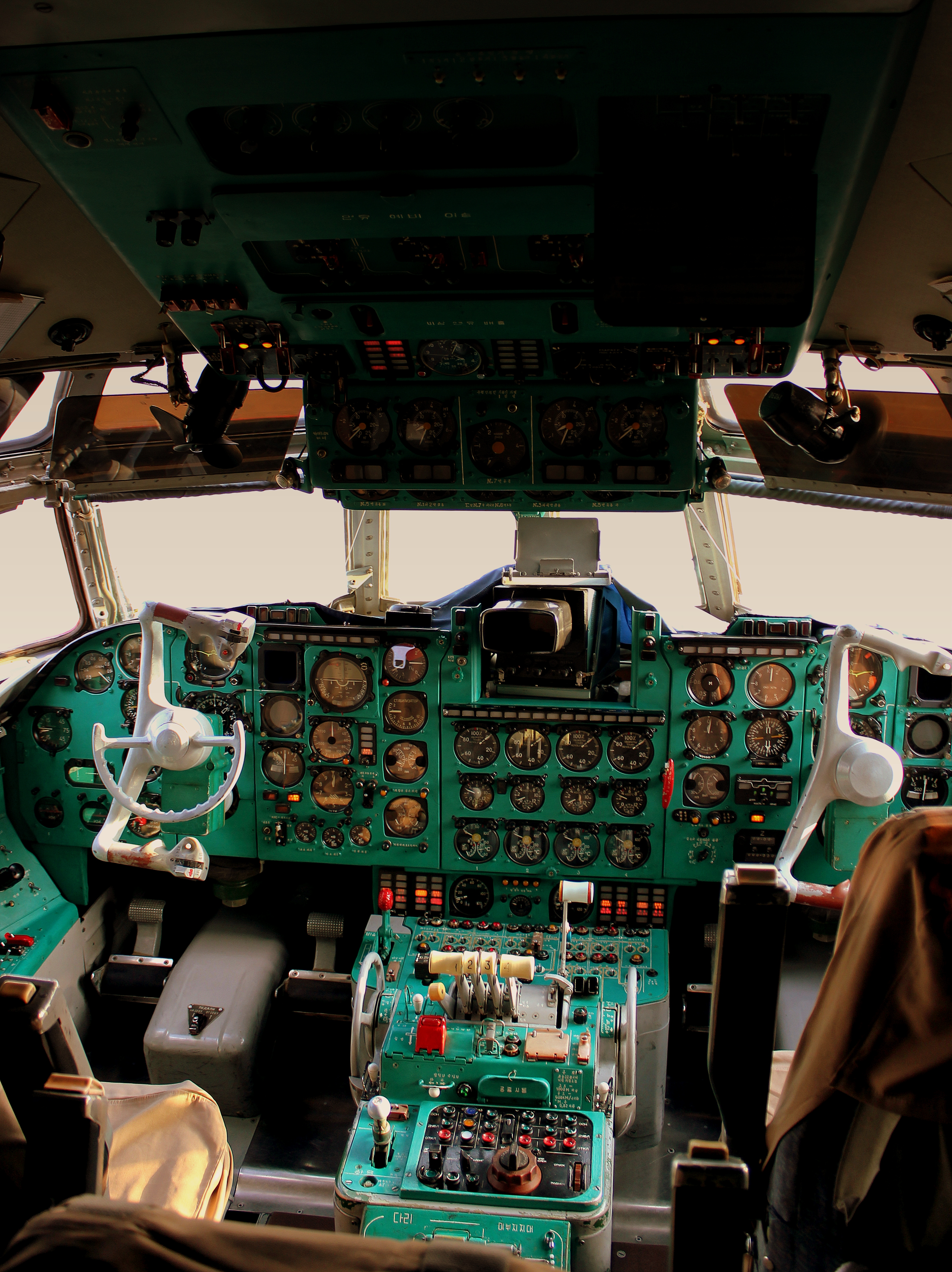 FLIGHT DECK VIEW AIR KOYRO IL62M P881 FLIGHT JS152 ON ARRIVAL PYONGYANG SUNAN AIRPORT DPR KOREA OCT 2012